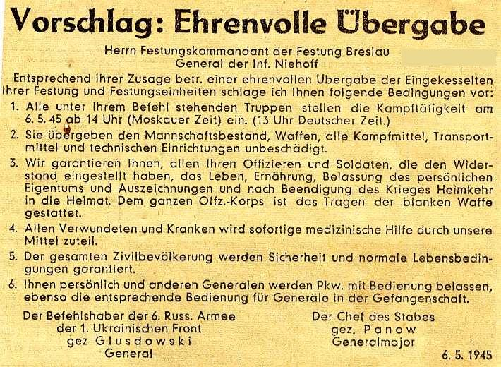 Kapitulationsbedingungen der Roten Armee an die Wehrmacht in Breslau